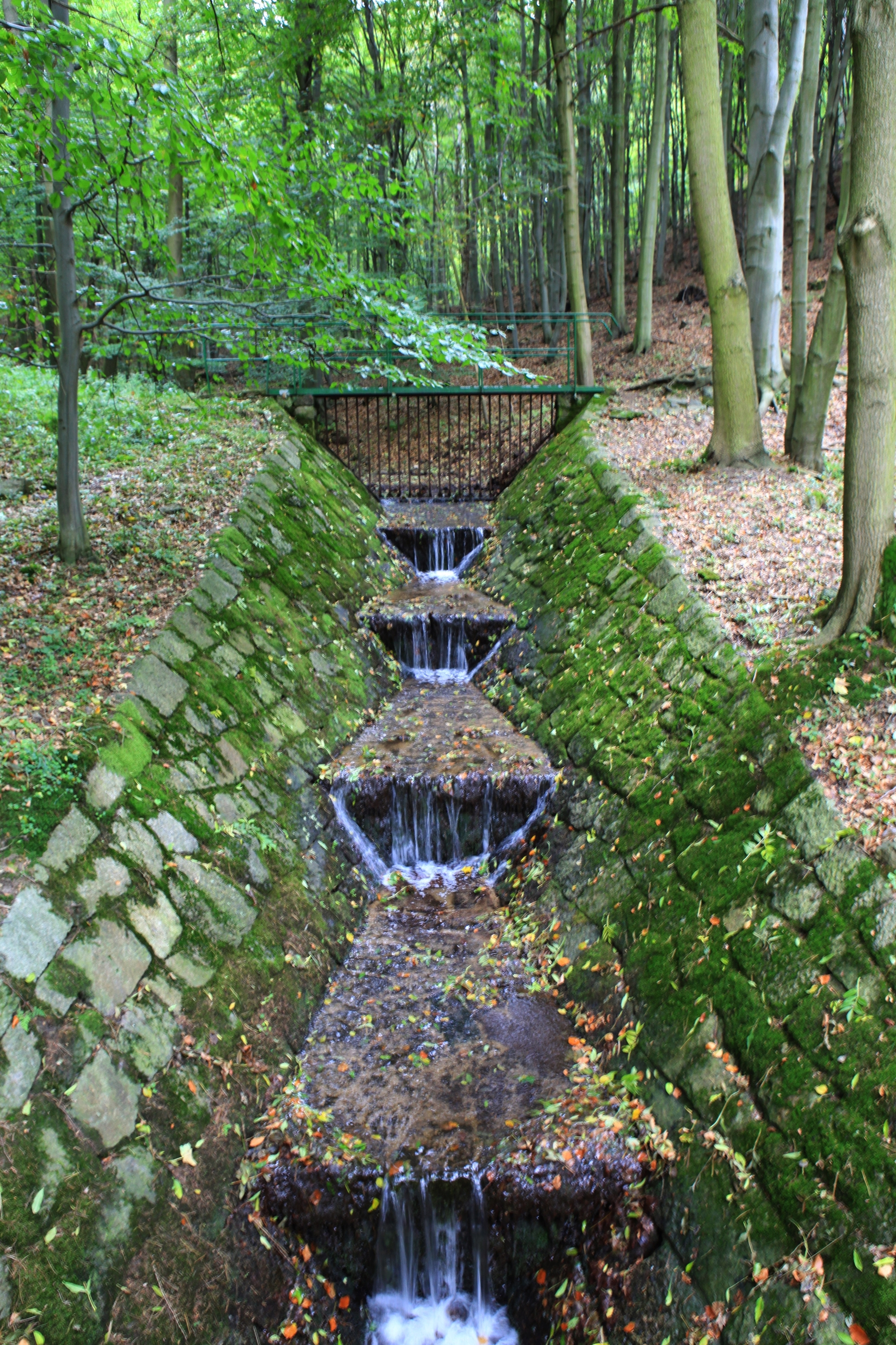 Vodní dílo - Janov